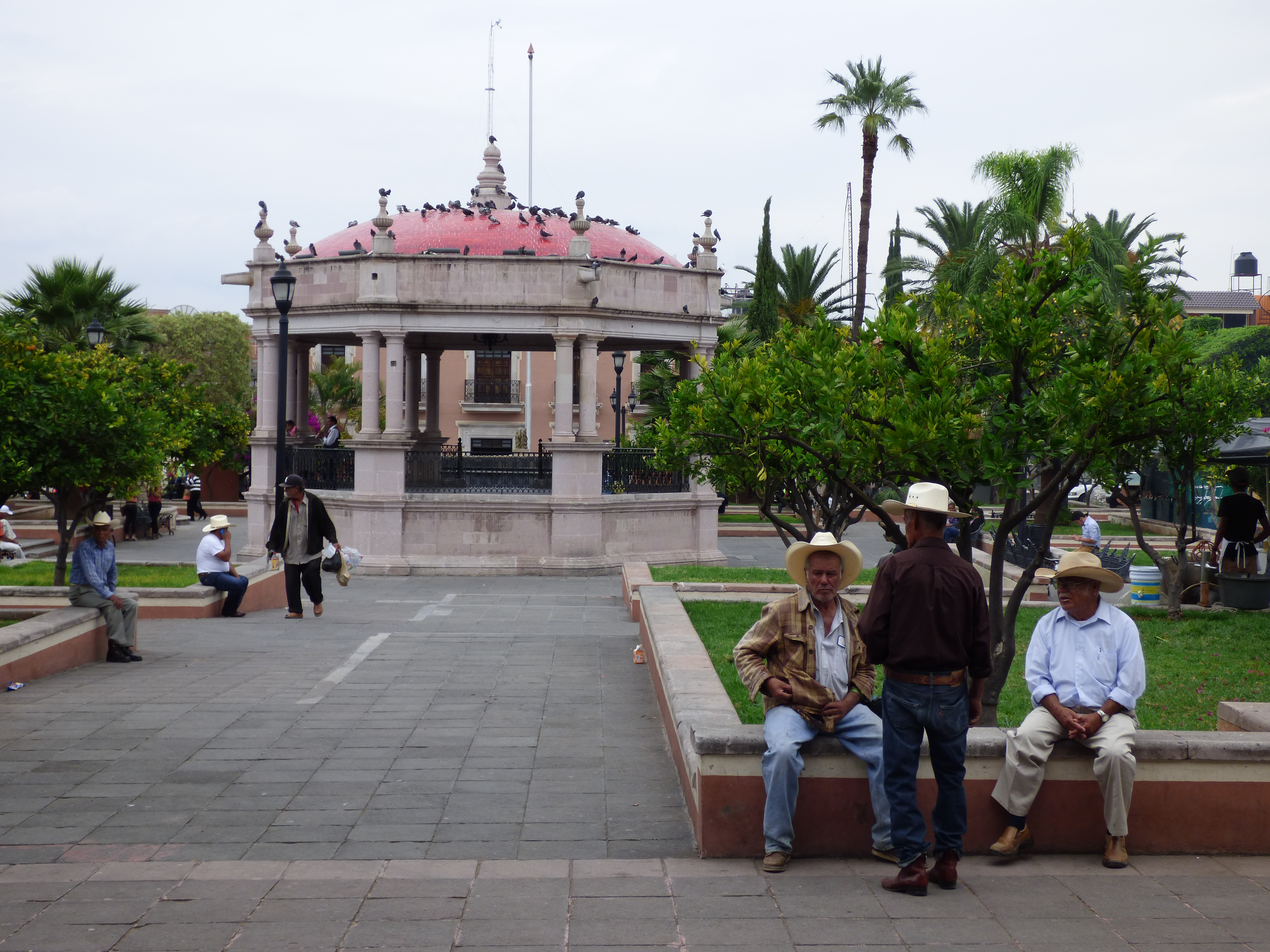 Recorrido Wiki Loves Monuments 2015 por Calvillo, Aguascalientes (Día 4)